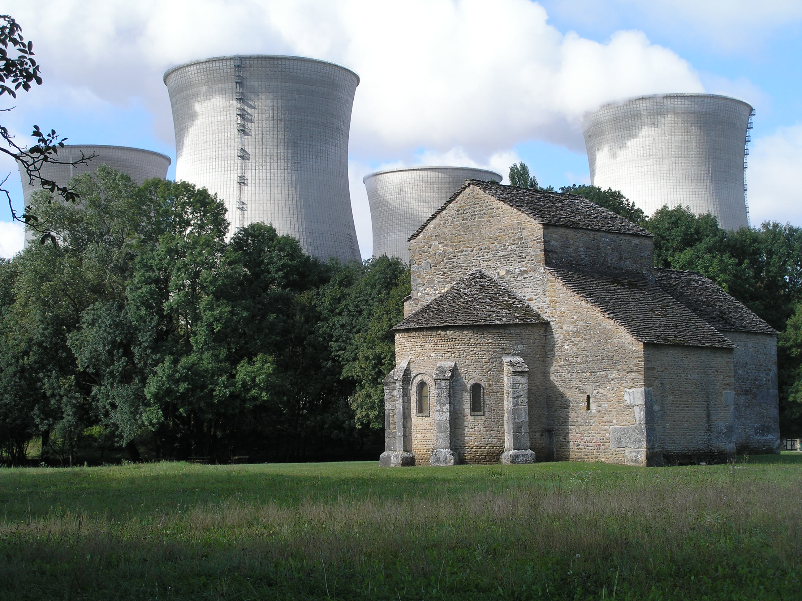 Chapelle de Marcilleux, Marcilleux (Classé, 1944) .